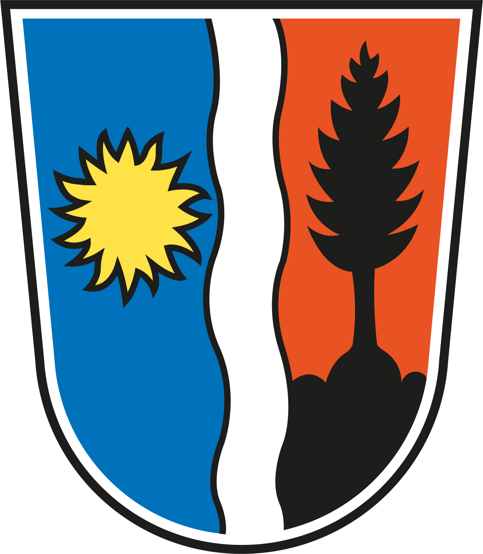 Lech, Vorarlberg: Ein silberner Wellenbalken spaltet Blau von Rot. Im vorderen blauen Feld eine goldene Sonne, im hinteren roten Feld auf schwarzem Dreiberg eine schwarze Tanne.